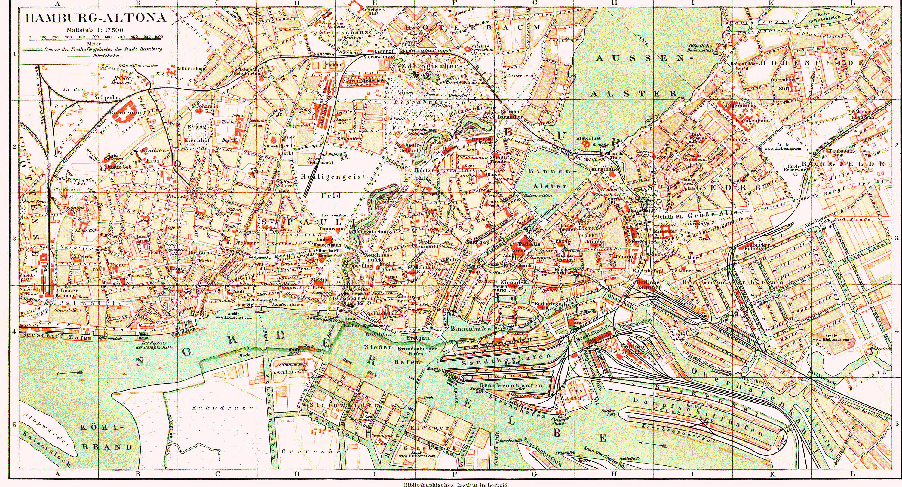 Plan von Hamburg und Altona ca. 1890 Das Hamburger Rathaus, erbaut 1886-1897, ist bereits eingezeichnet, nicht aber die 1893-1898 erfolgte Verlegung des Altonaer Bahnhofs an seinen heutigen Standort. Erst recht fehlen Mönckebergstraße und Hauptbahnhof, die erst nach 1900 errichtet wurden, und der Bereich um den Meßberg ist noch im alten Zustand.